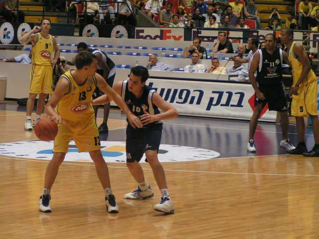 שאראס